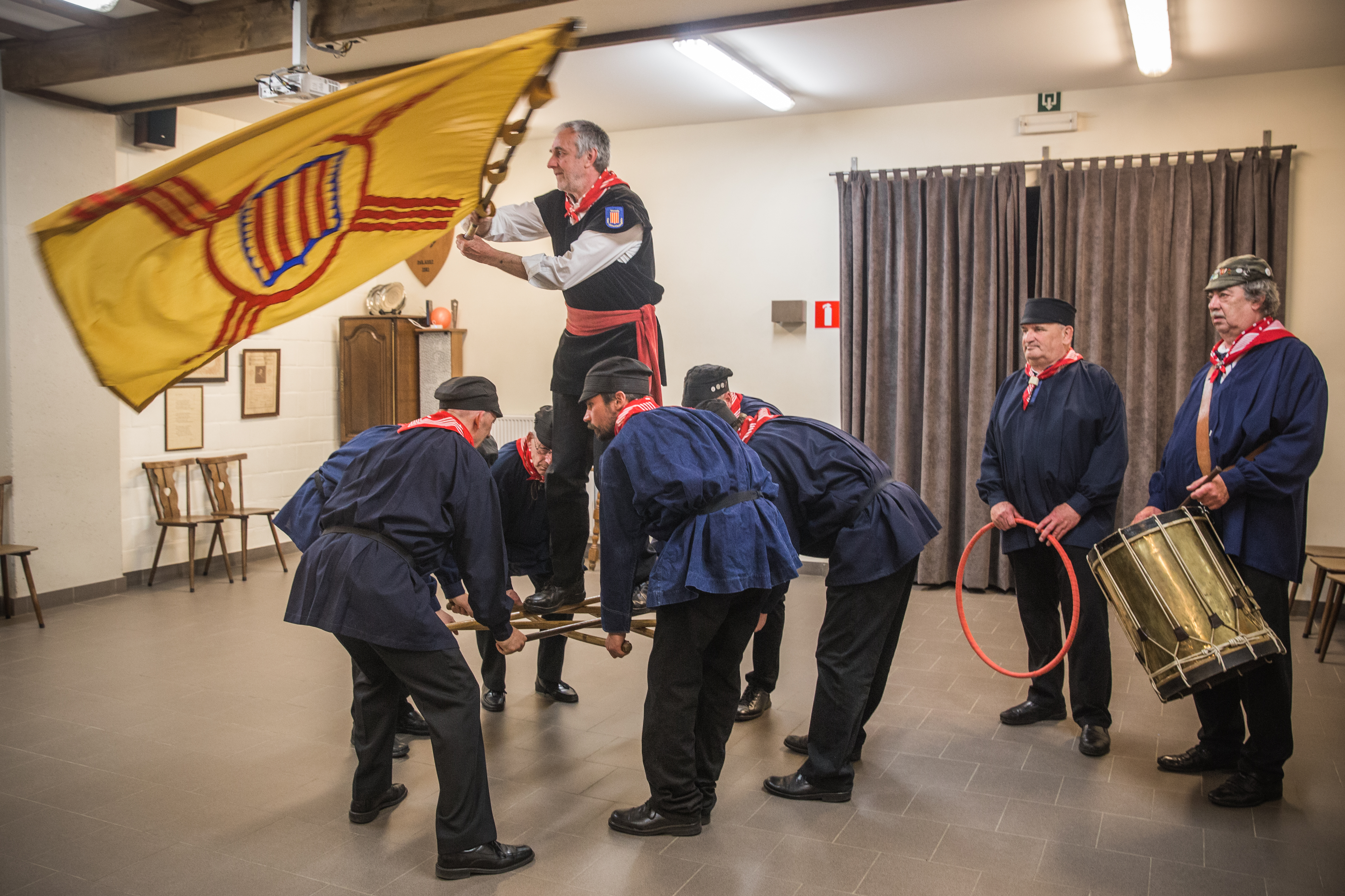 Finale van de trawantel, een traditionele stokkendans onder begeleiding van een trom. De vendelier moet op het einde op de stokken gaan staan en met de vlag zwaaien terwijl de dansers ronddraaien. Uitgevoerd door de Sint-Sebastiaansgilde in Westerlo.